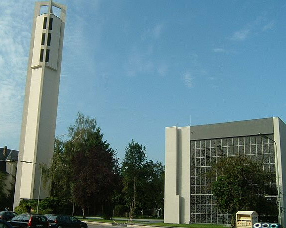 evangelische Dornbuschkirche der Dornbuschgemeinde in Frankfurt-Dornbusch. Renoviert und restauriert 2004/2005